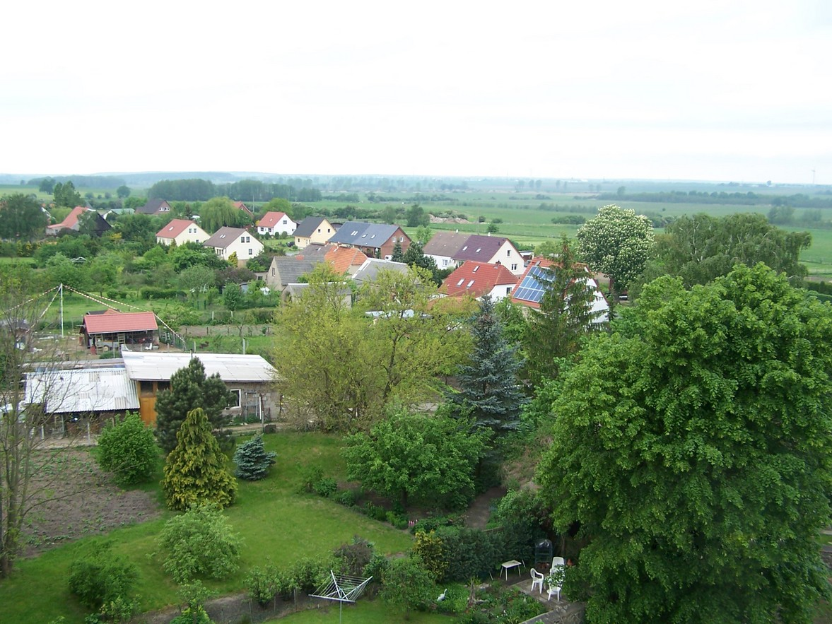 Ganzkow - "Unterdorf"